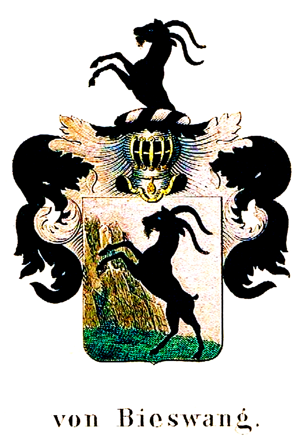 Wappen der von Bieswang (Biswang, Bischwang)